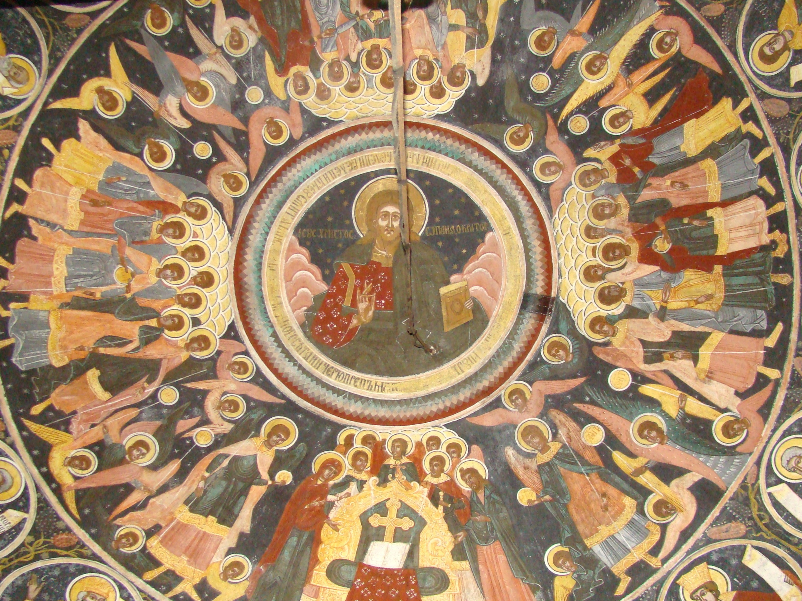 Biserica "Naşterea Domnului" , sat SĂRATA; comuna PORUMBACU DE JOS